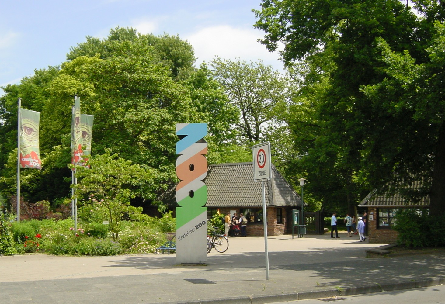 Bildbeschreibung: Eingang Zoo, Krefeld Quelle: selbst fotografiert Datum: 18.06.2006 Fotograf/Zeichner: DER UNFASSBARE